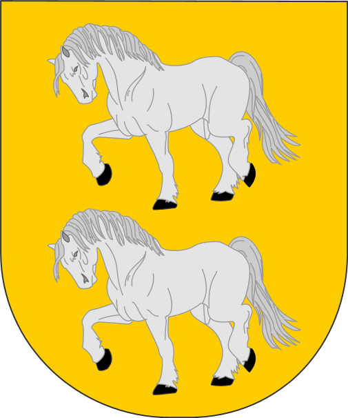 Zaldibia herriko armarria